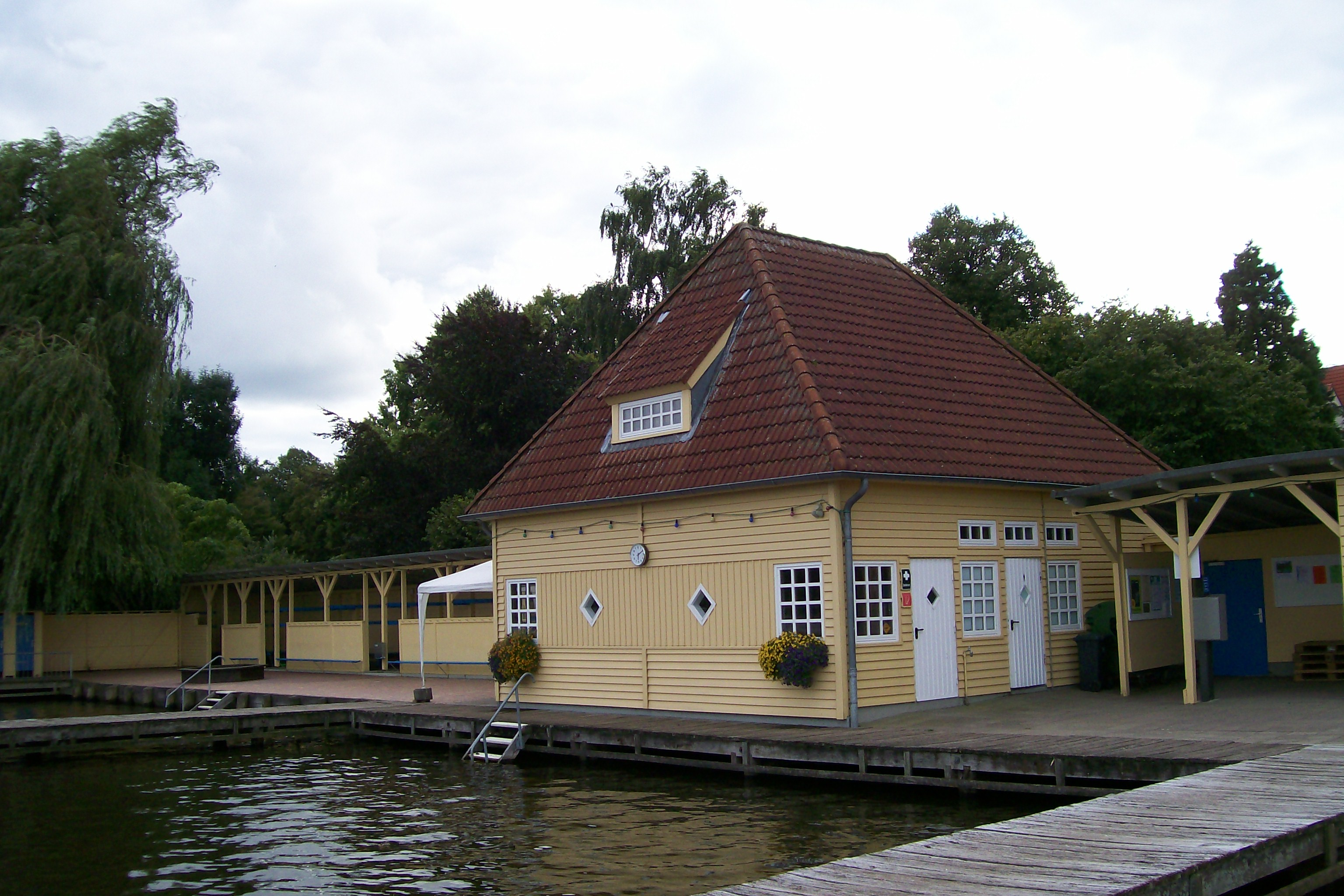 Freibad an der Falkenwiese at river Wakenitz in Lübeck, Germany